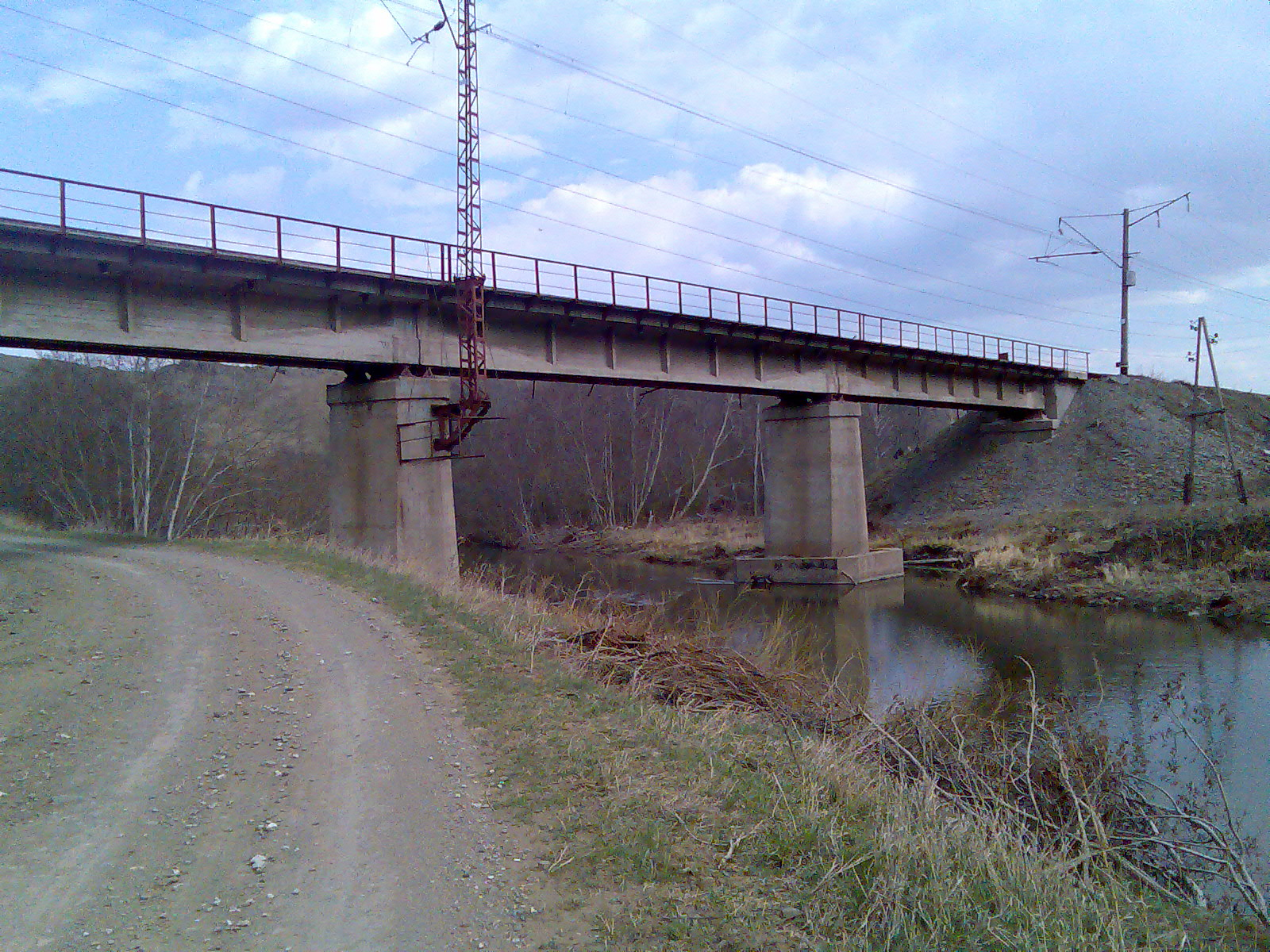 Ж/д мост через реку Малый Кизил. Автотрасса P-316